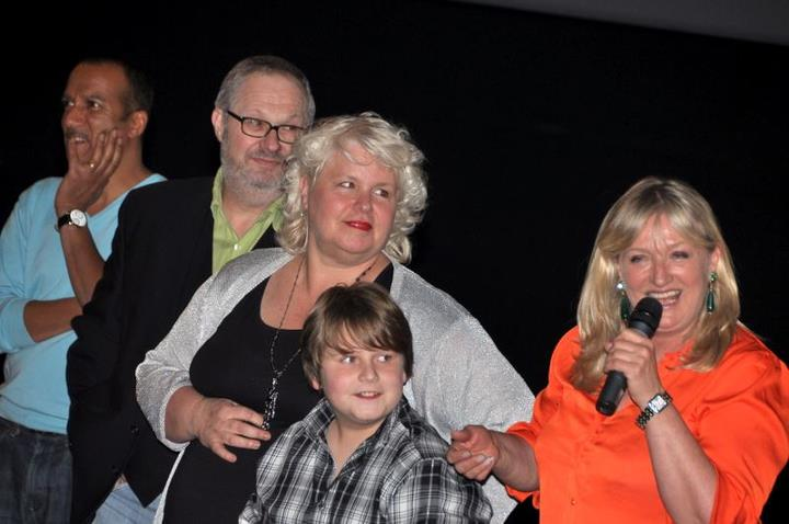 Avant-première du film Mince alors !.